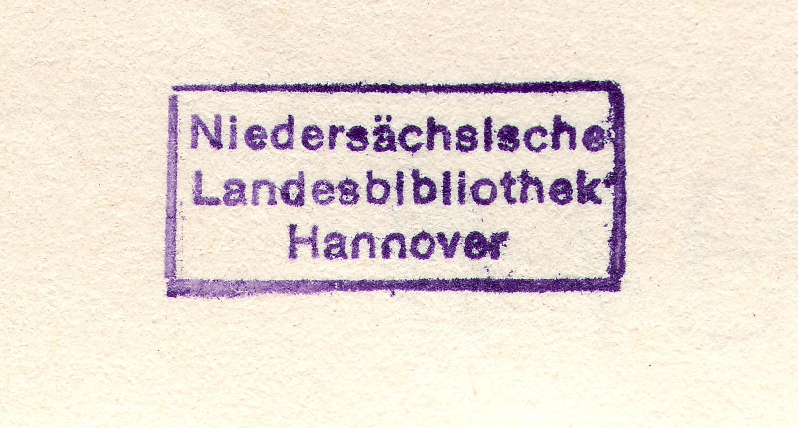 Besitzstempel in den Buchbeständen der Bibliothek.